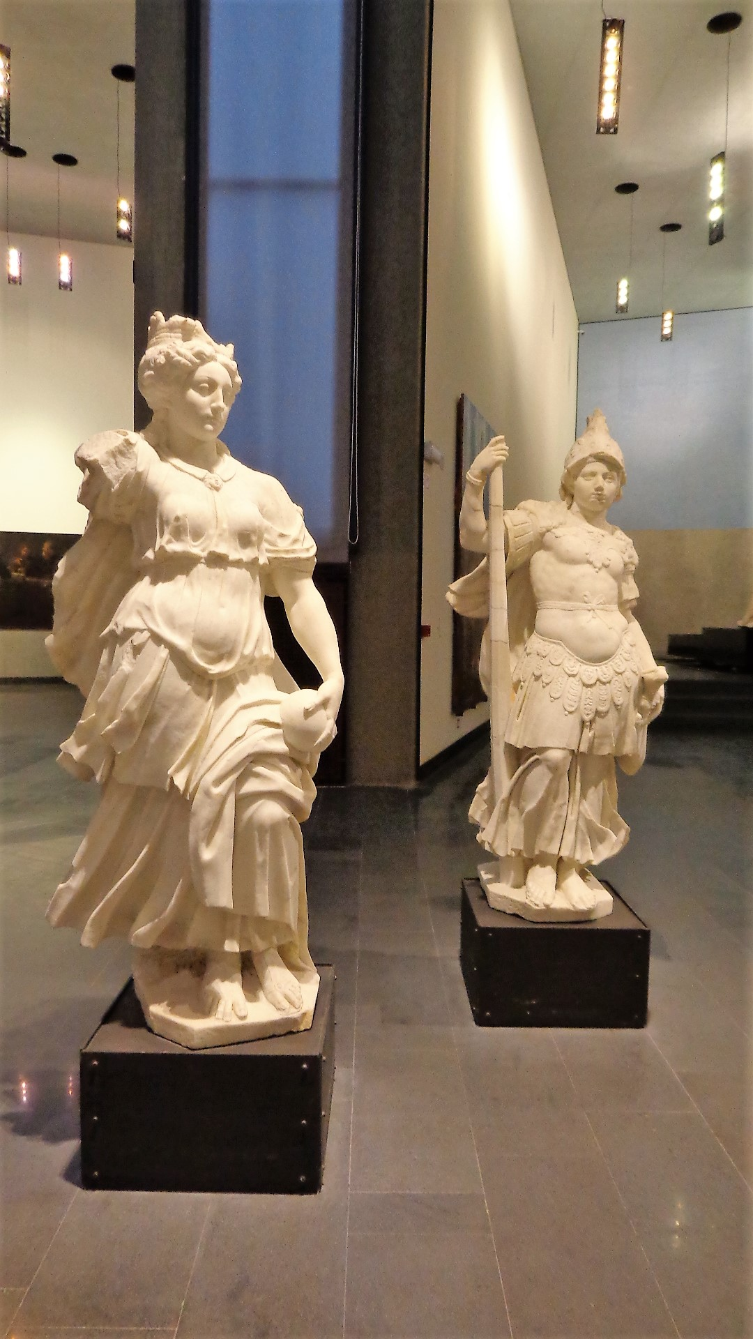 Statue marmoree